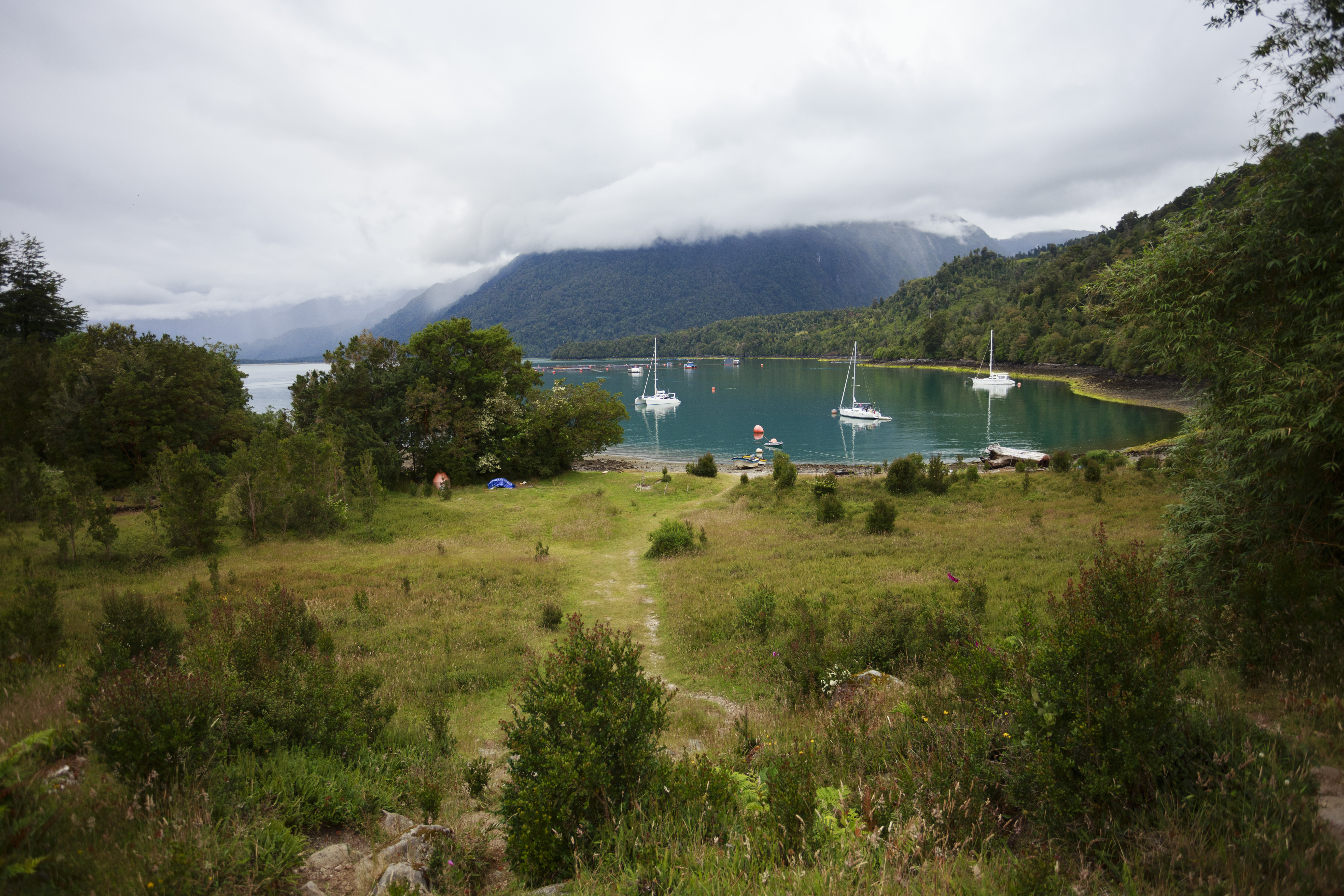 fiordo comau, chaitén